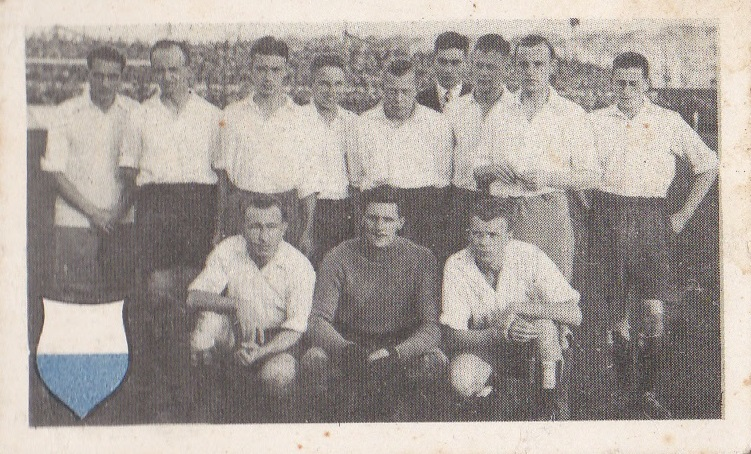 HFC Haarlem, Eerste Klasse West, 1931-1932. Reydon, van Riemsdijk, de Ruyter, Lamp, Hagenaar, P. Jongeneel, v.d. Lee, R. Jongeneel, Wamsteker, van Baasbank, van d. Meulen